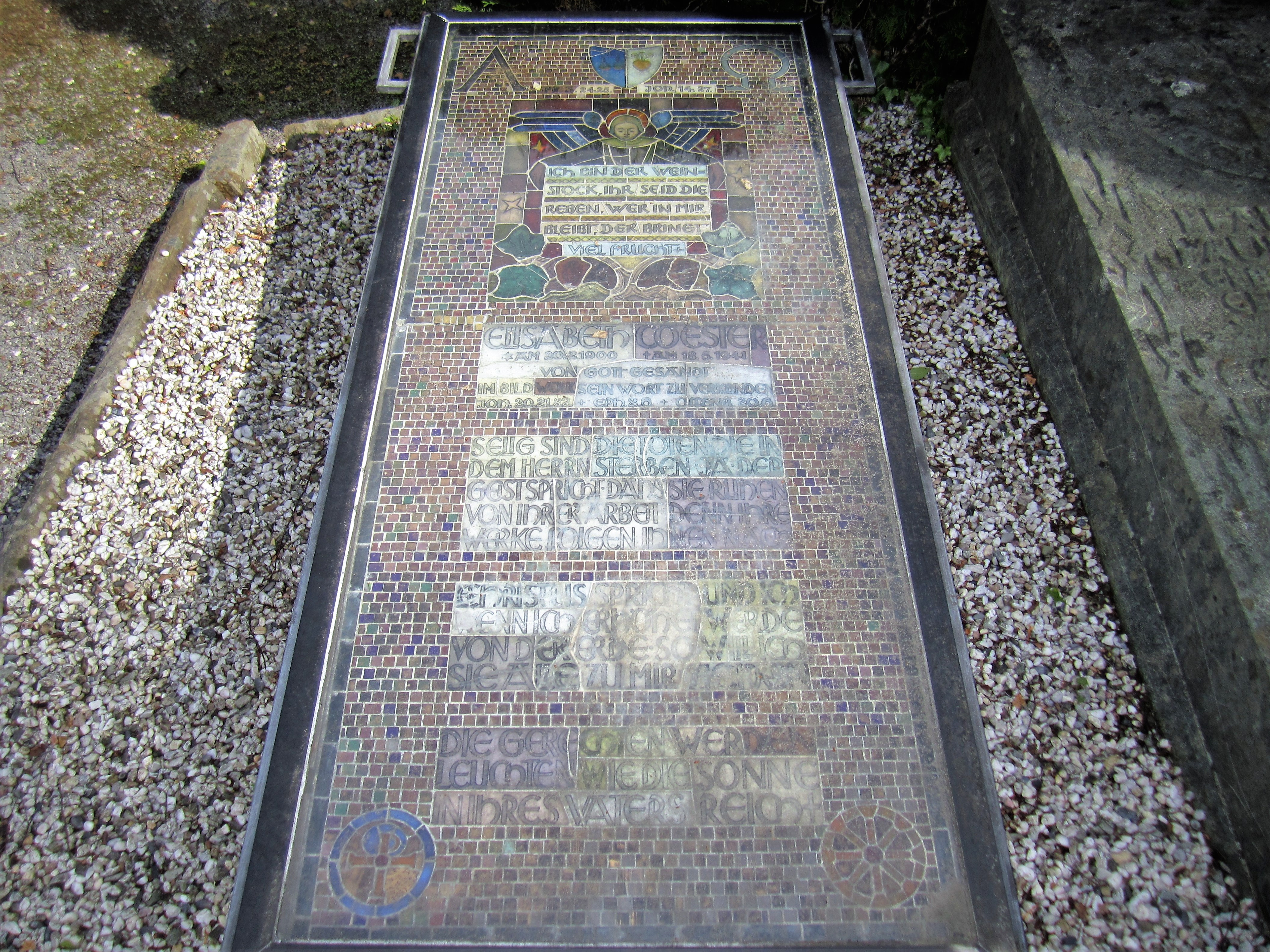 Denkmalgeschütztes Grabmal (Ehrengruft) auf dem ev.-ref. Ostfeld-Friedhof in Hagen-Hohenlimburg, Iserlohner Straße. Die Künstlerin Elisabeth Coester (1900-1941), die auch die kunstgeschichtlich bedeutsame Glaswand in der Friedhofskapelle schuf, liegt hier unter einer vor ihrem Tode selbst entworfenen Mosaikplatte begraben. Inschriften: „Elisabeth Coester – von Gott gesandt, im Bildwerk sein Wort zu verkünden“ sowie „Ich bin der Weinstock, ihr seid die Reben, wer in mir bleibt, der bringt viel Frucht“. This is a photograph of an architectural monument.